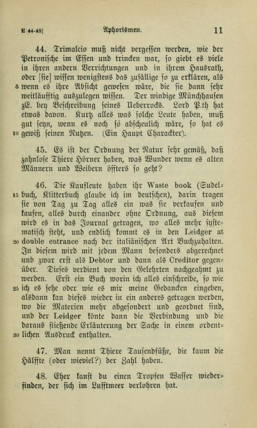 Georg Christoph Lichtenbergs Aphorismen. Nach den Handschriften hrsg. von Albert Leitzmann. Drittes Heft: 1775-1779. B. Behr’s Verlag, Berlin 1906 (Reihe Deutsche Literaturdenkmale des 18. und 19. Jahrhunderts, Nr. 136), S. 11